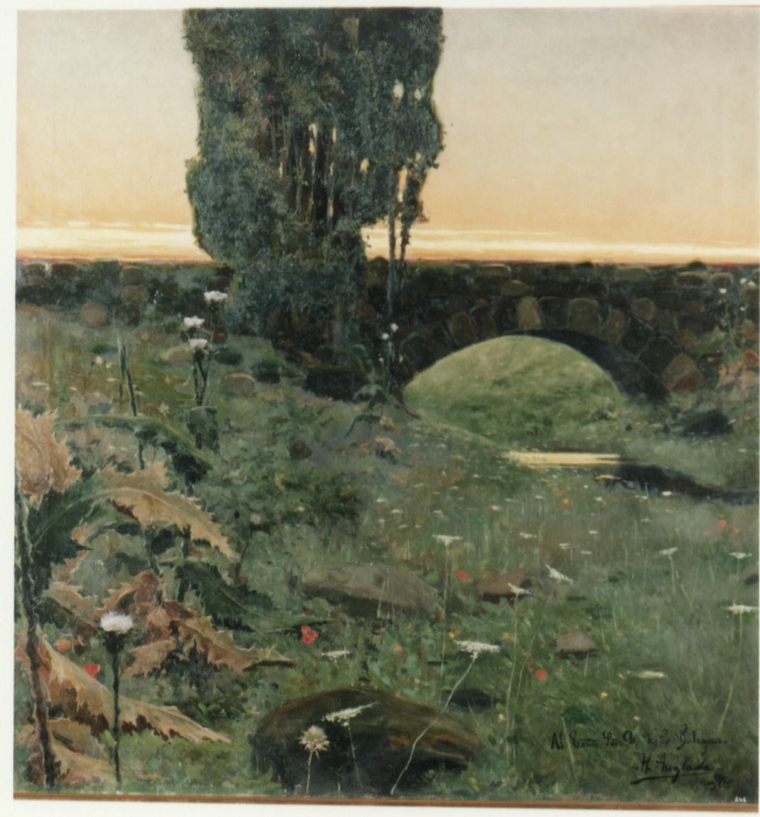 Paisatge amb pont. Representació d'un paisatge a la tardor. Aquest és presidit per un pont de pedra per sota del qual passa un petit rierol, a banda i banda del qual hi ha pedres i vegetació, formada per plantes i matolls. Al centre del marge superior de la tela trobem uns xiprers. A l'angle inferior esquerre hi ha cards